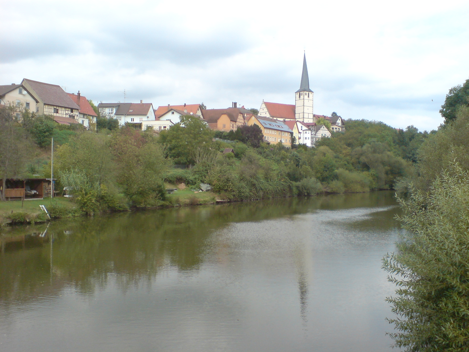 Hardthausen am Kocher, Ortsteil Gochsen, Partie am Kocher